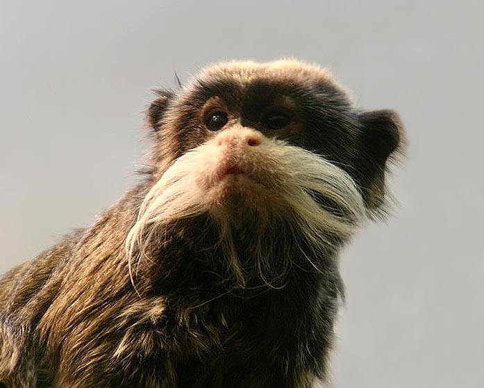 Kaiserschnurrbarttamarin (Saguinus imperator); Aufgenommen mit einer Canon EOS 300D im Kölner Zoo